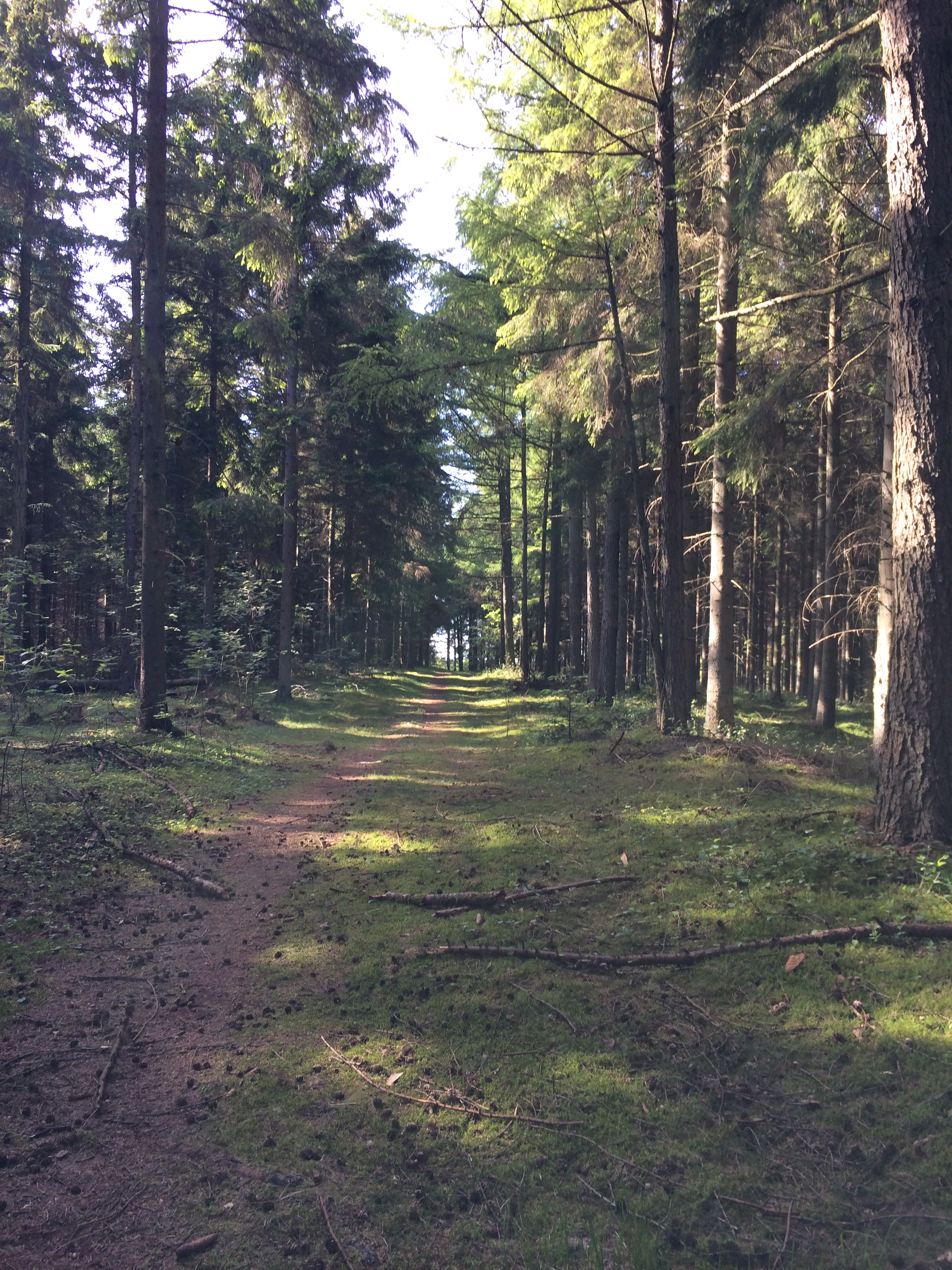 Marienhøj Plantage ved Hadsund.